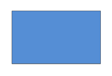 Exemple de rectangle